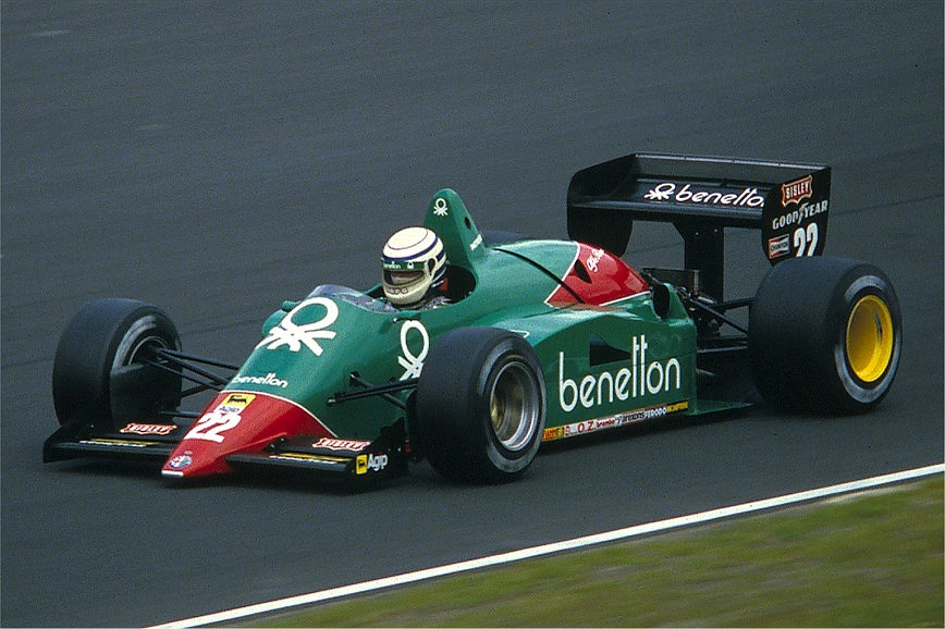 Riccardo Patrese im Alfa Romeo 184 T 1985 beim Training zum Großen Preis von Deutschland auf dem Nürburgring. Anmerkung: Im Programmheft zum GP ist der Wagen als 185 T bezeichnet, der jedoch in diesem Rennen nicht mehr eingesetzt und durch den Vorgängertyp ersetzt wurde.